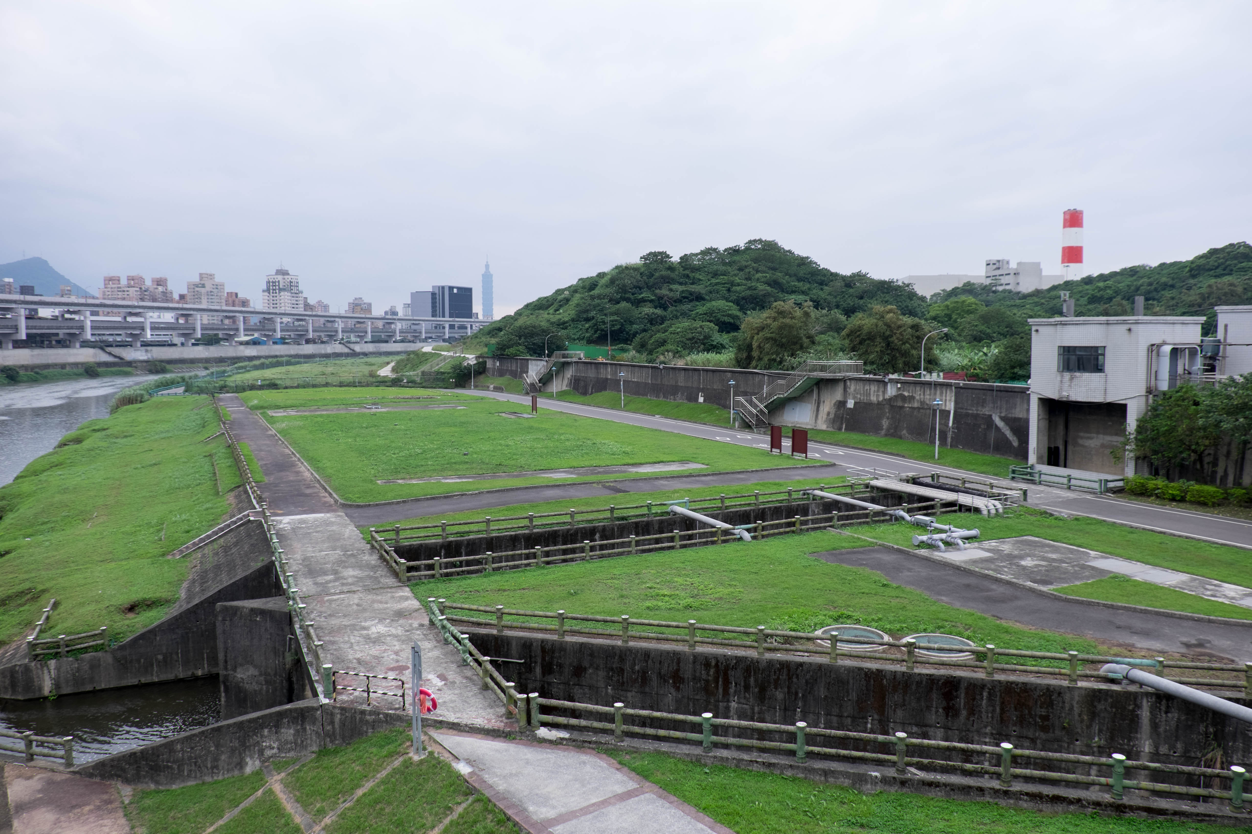 中文（台灣）: 從南湖大橋西側人行道俯覽南湖抽水站取水口與南湖右岸河濱公園。